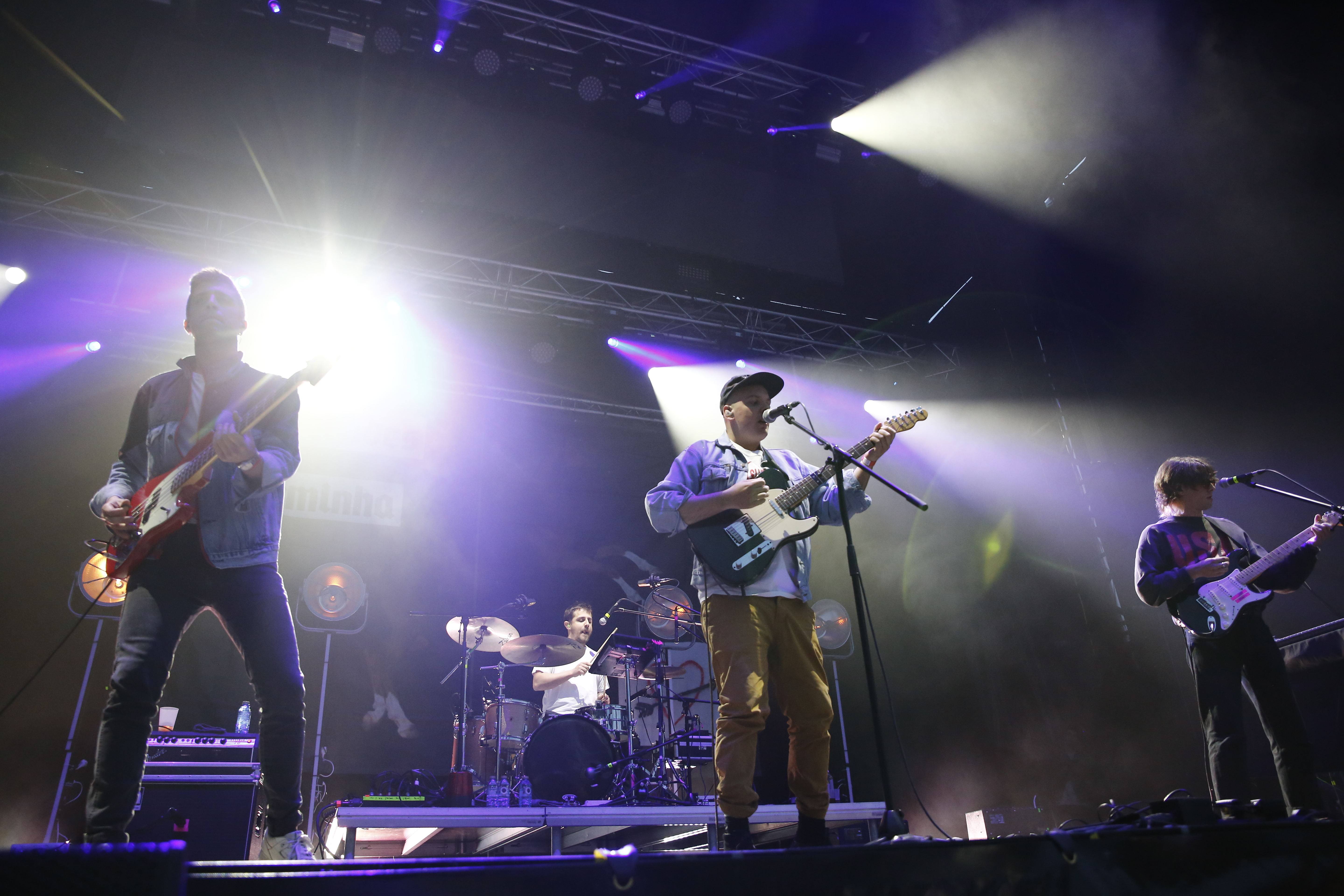 Actuación de Novedades Carminha en el festival Palencia Sonora 2019.